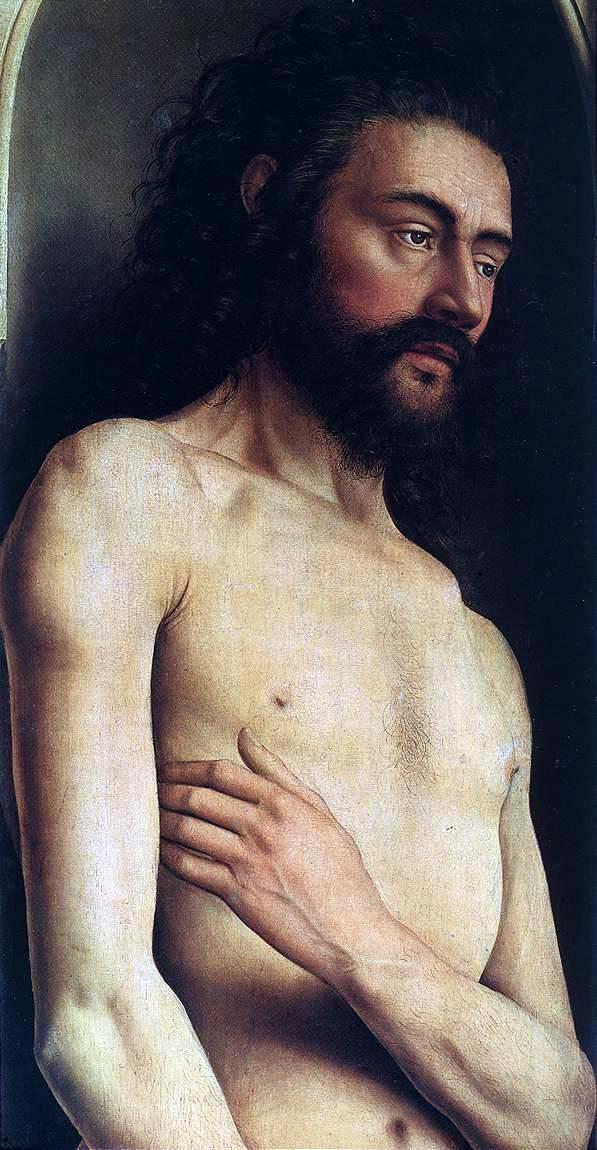 detail